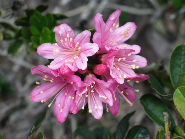 Bejaria imthurnii (Ericaceae) @ Roraima-Tepui, Venezuela